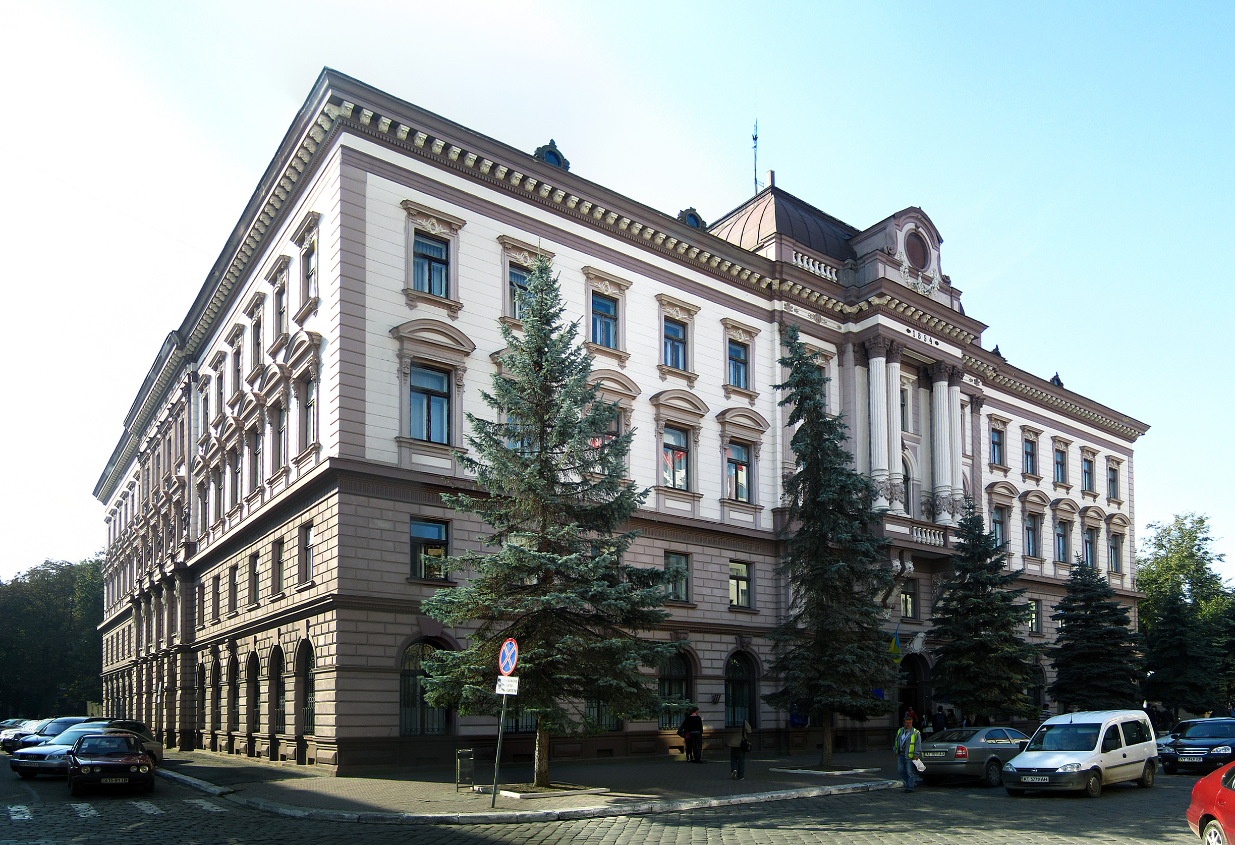 Медакадемія (Івано-Франківськ)